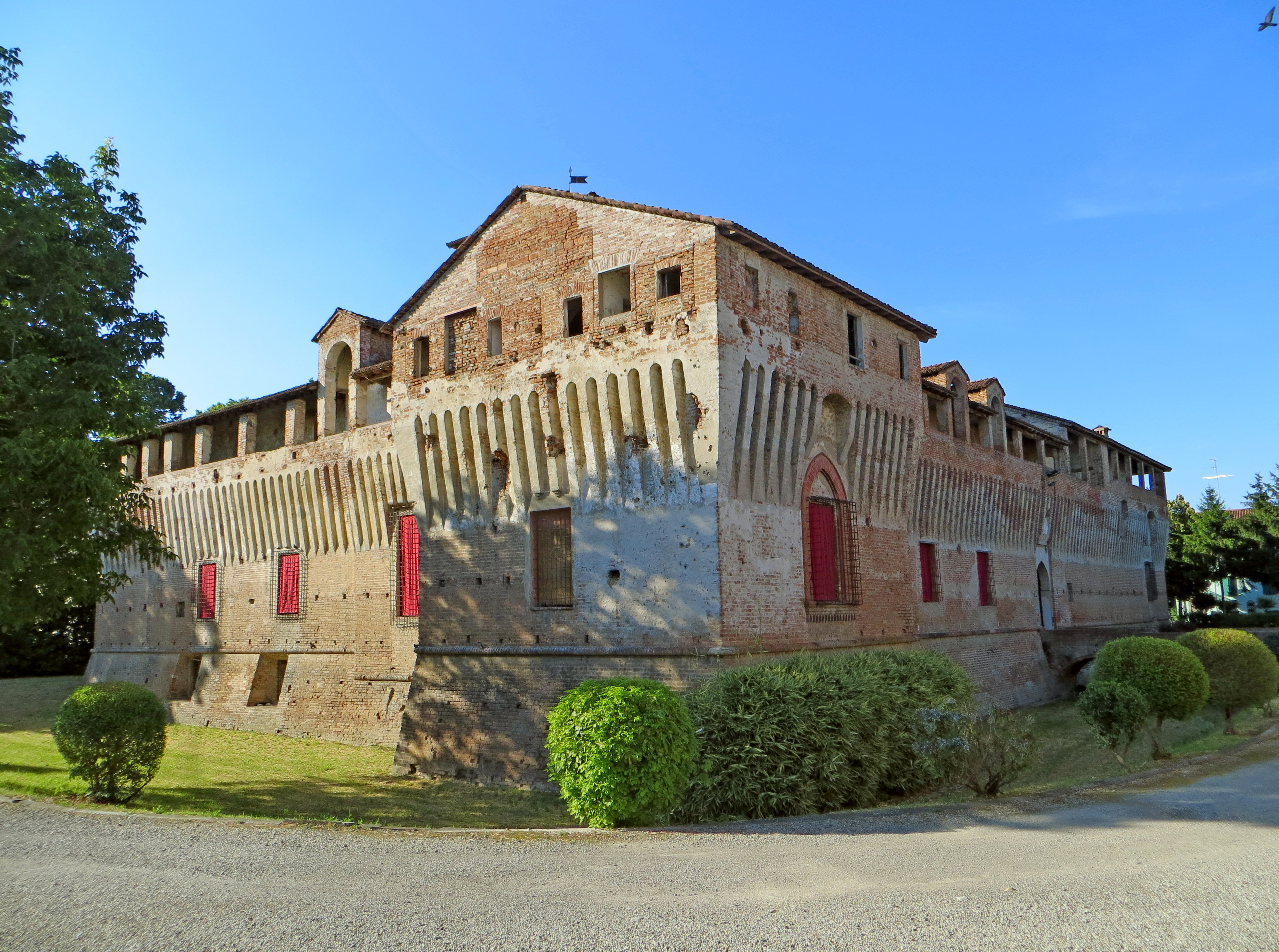 Rocca dei Rossi (Roccabianca) - facciata e lato sud